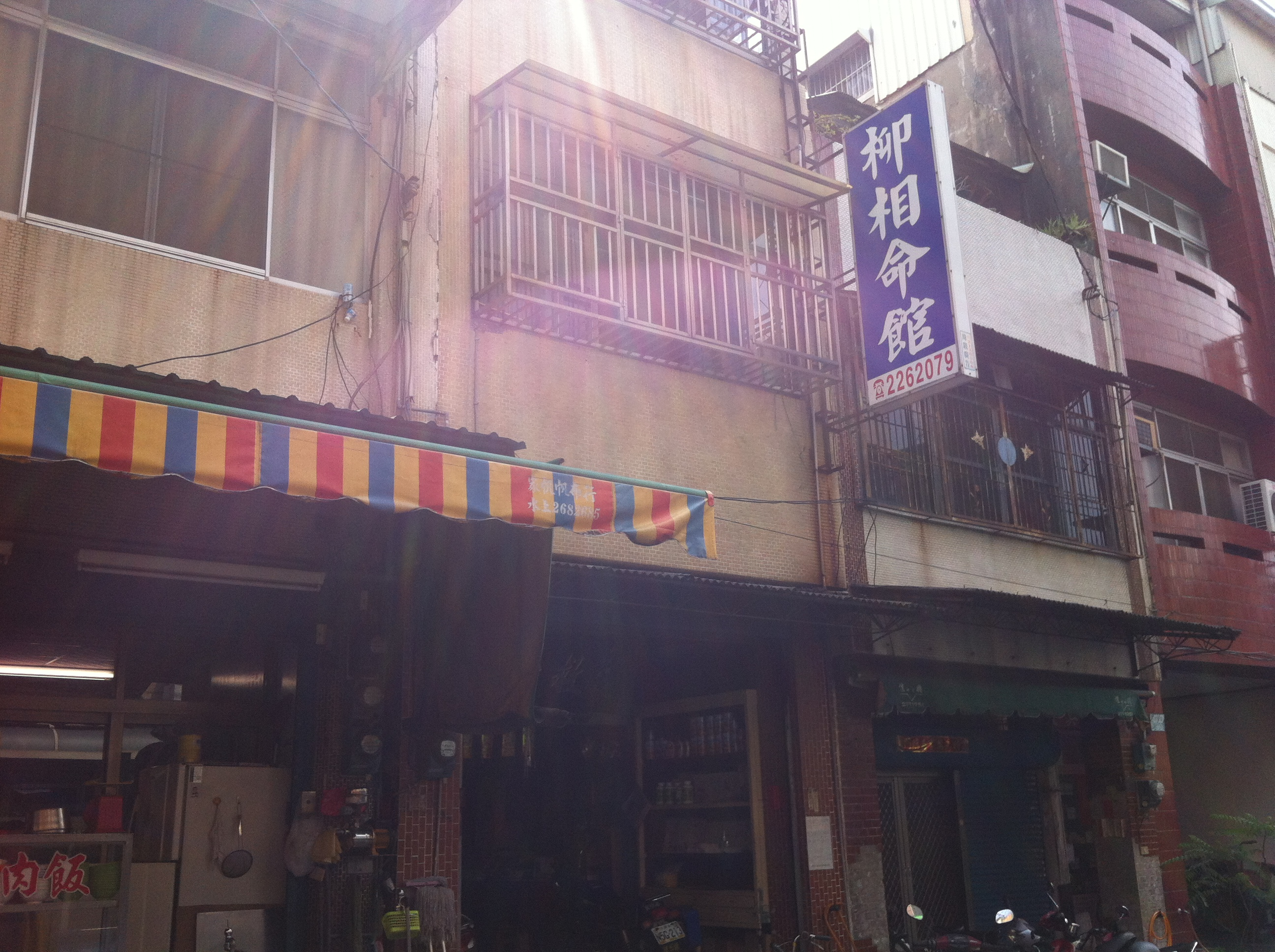 中文（台灣）: 民雄柳相士命相館